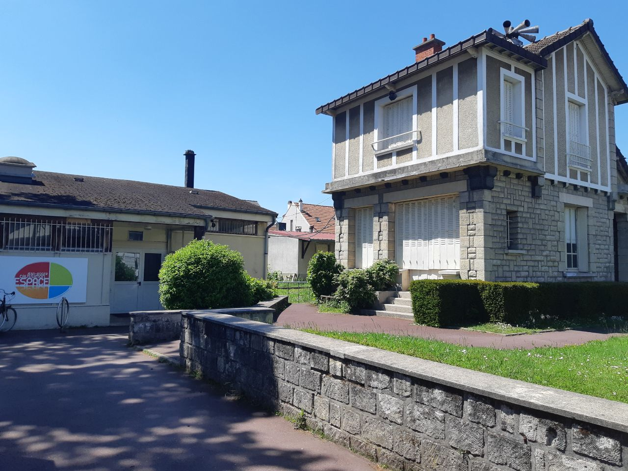 Deux bâtiments abritant les ateliers de l'Espace Jean-Roger Caussimon